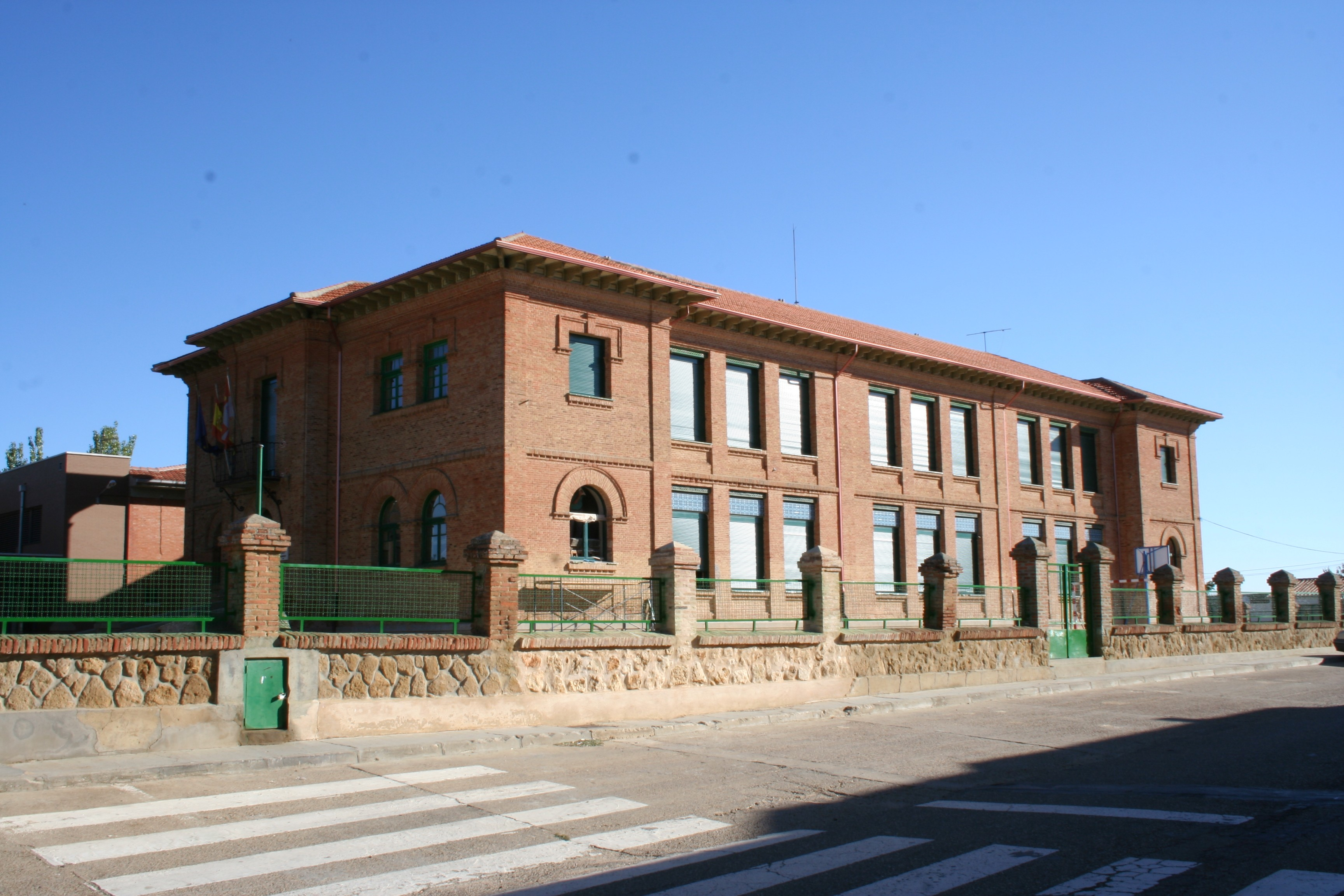 Escuelas